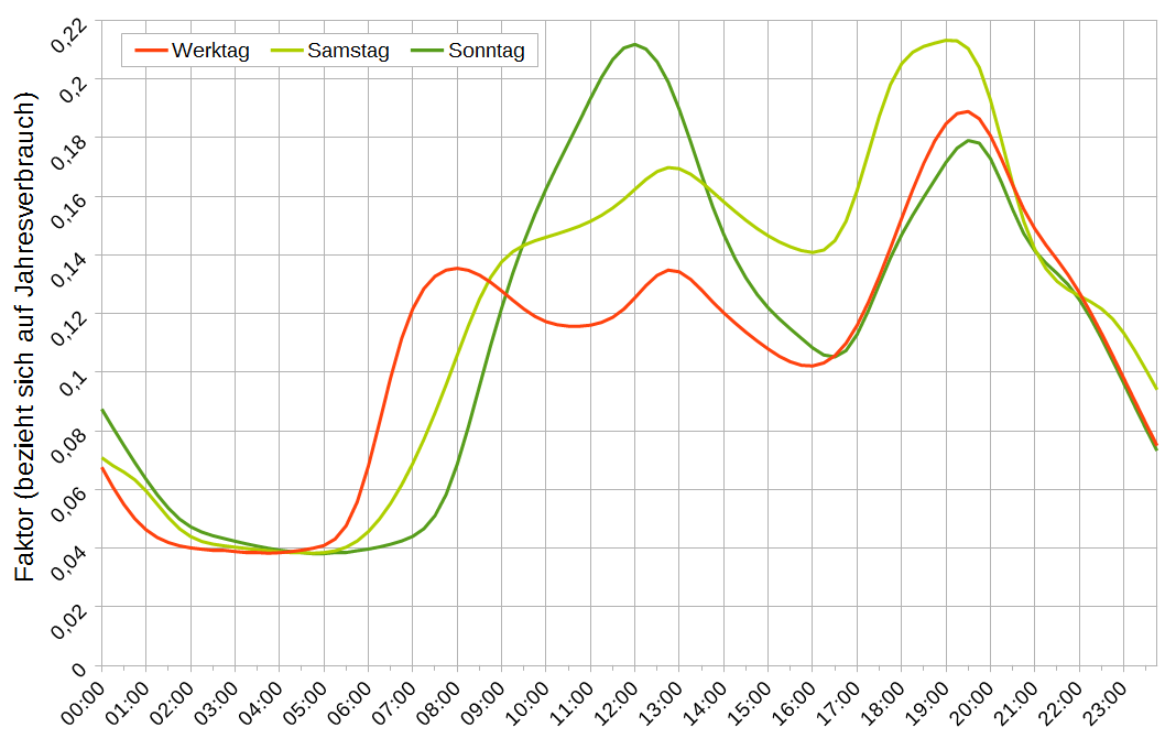 Lastprofil des VDEW für H0 (Haushalte) in den Wintermonaten